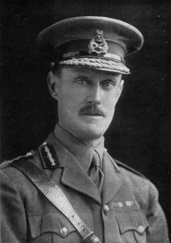 Lieut. Gen Sir A. J. Godley, K.C.B., K.C.M.G.